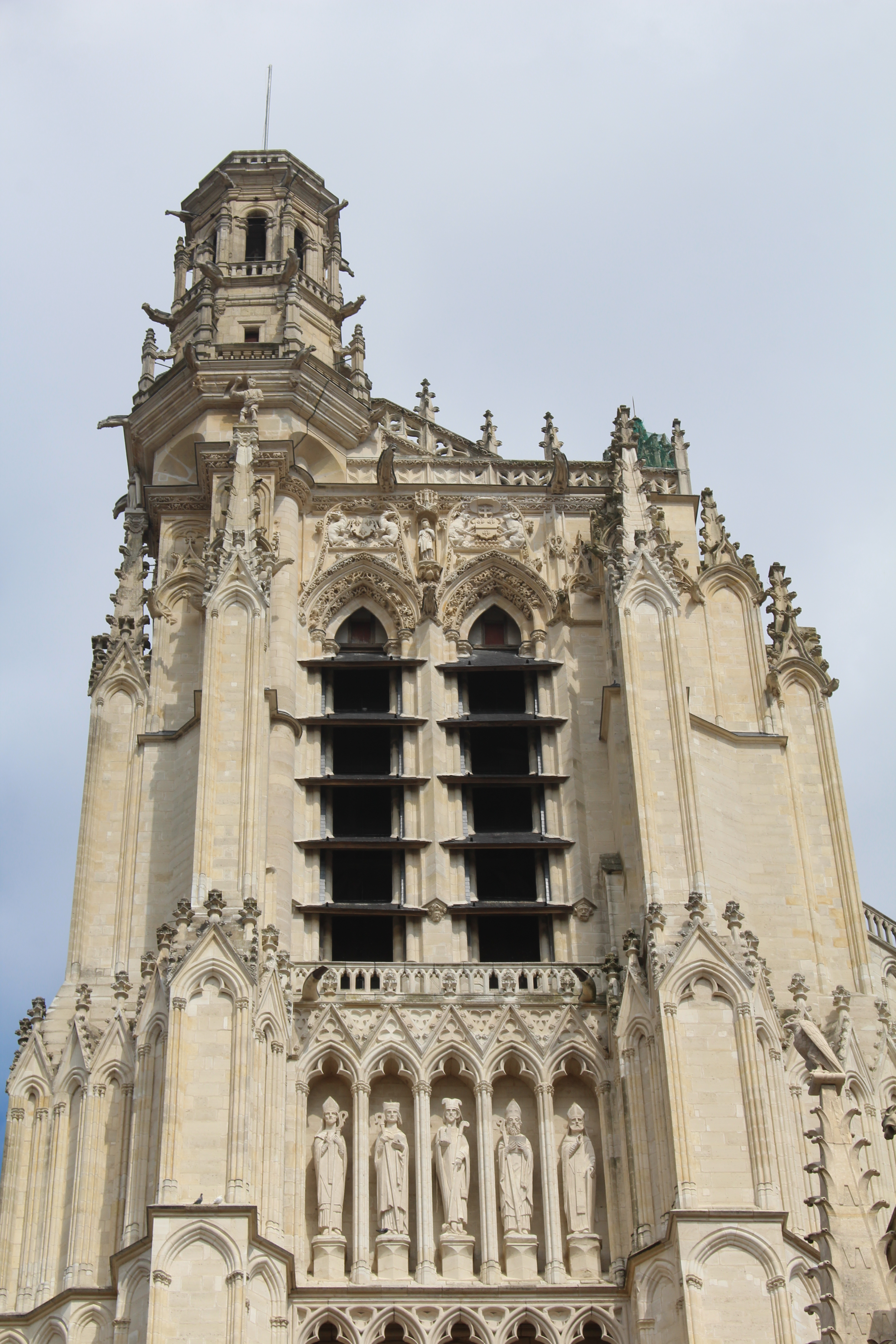 Cathédrale Saint-Étienne de Sens.